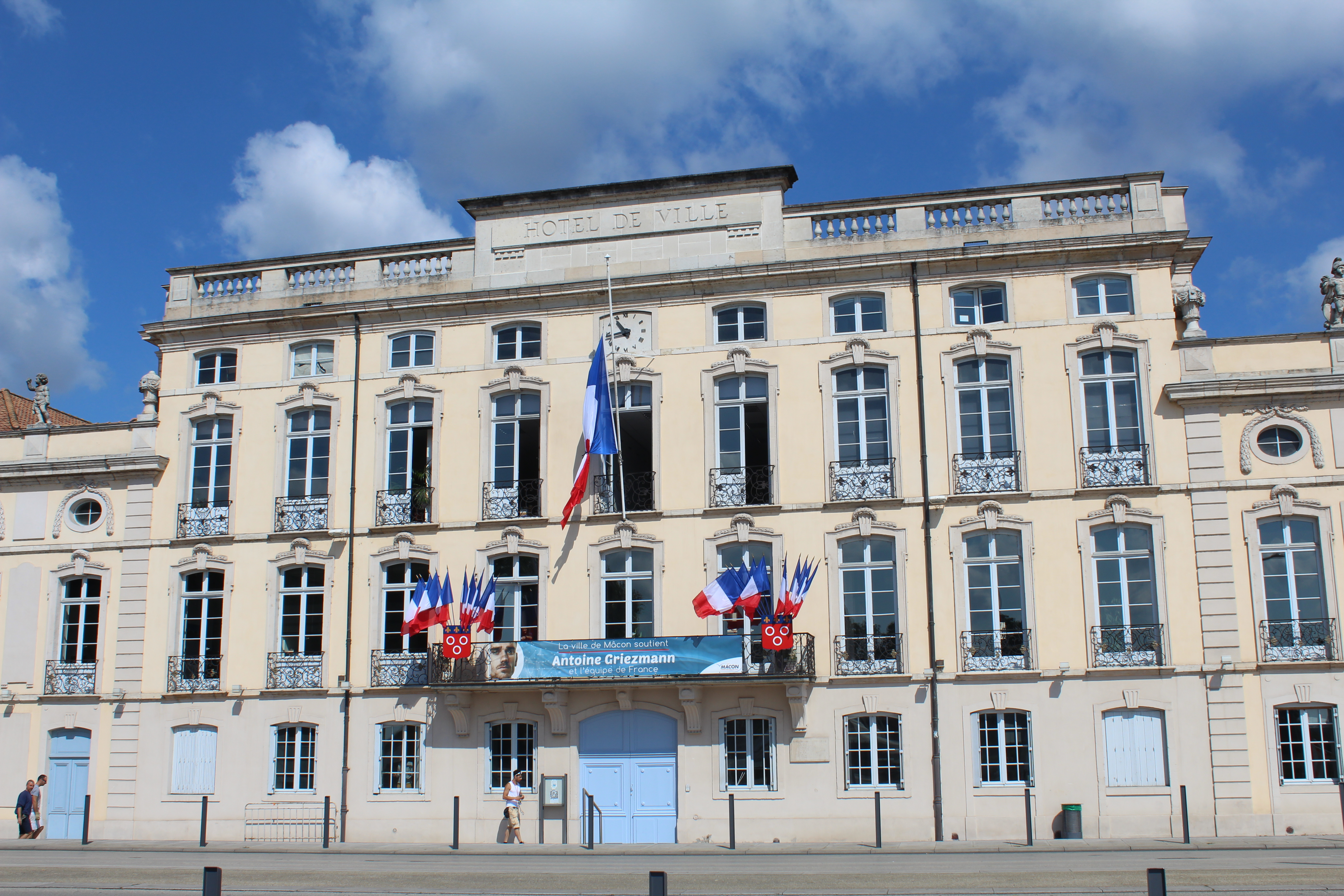 Façade de l'hôtel de ville de Mâcon.